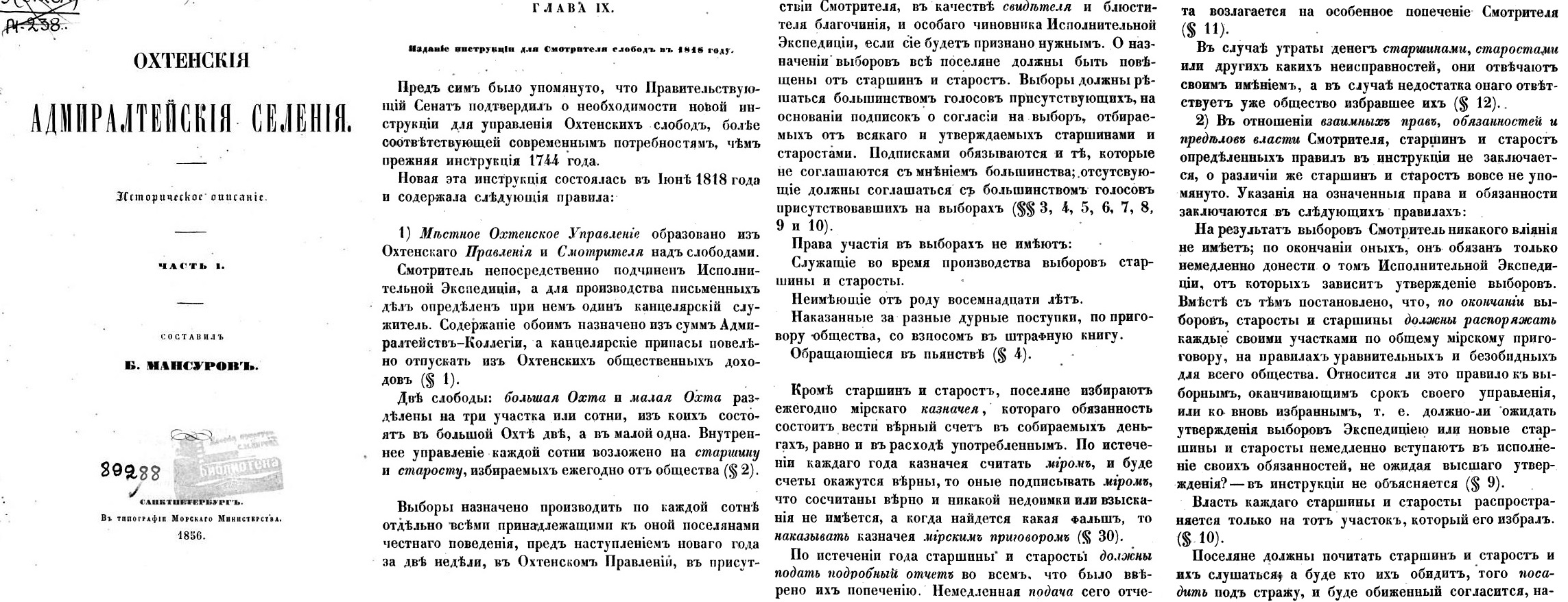 Копия страниц книги